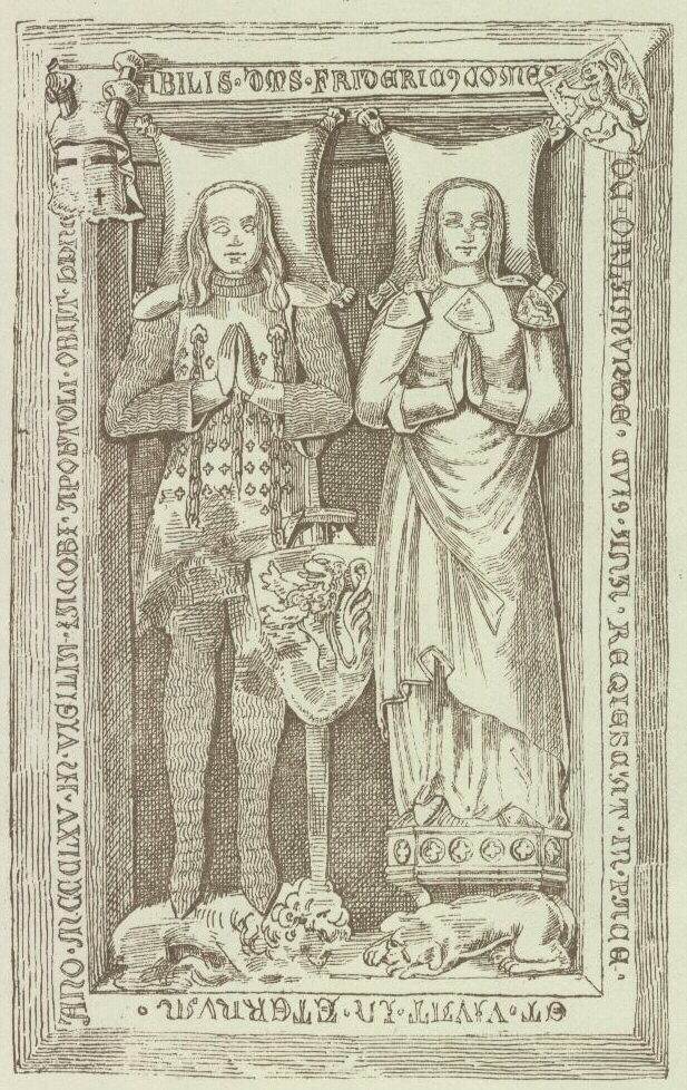 Bildunterschrift: Grabsteine von Graf Friedrich I. von Orlamuende / Herrn zu Weimar, Wiehe, Buch und Schoenwerde / gest. den 25. Juli // Eilisabet Gräfin von Orlamuende / Gräfin von Aschersleben // zu Oberweimar